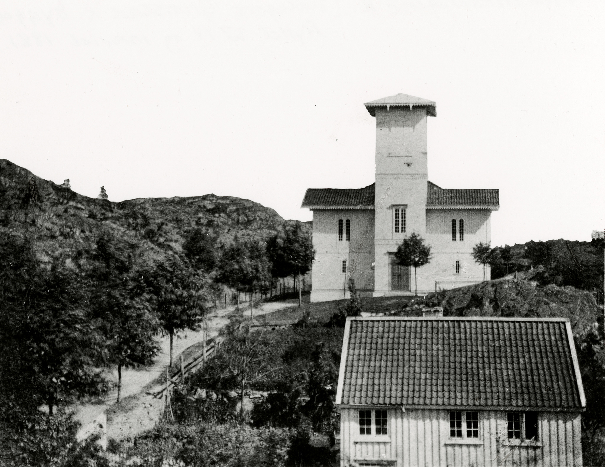 Grimstad bys første kirke før den ble tatt ned og flyttet til Nedenesengene, der den fortsatt står. Ukjent fotograf, fra Kulturminnebilder.no.